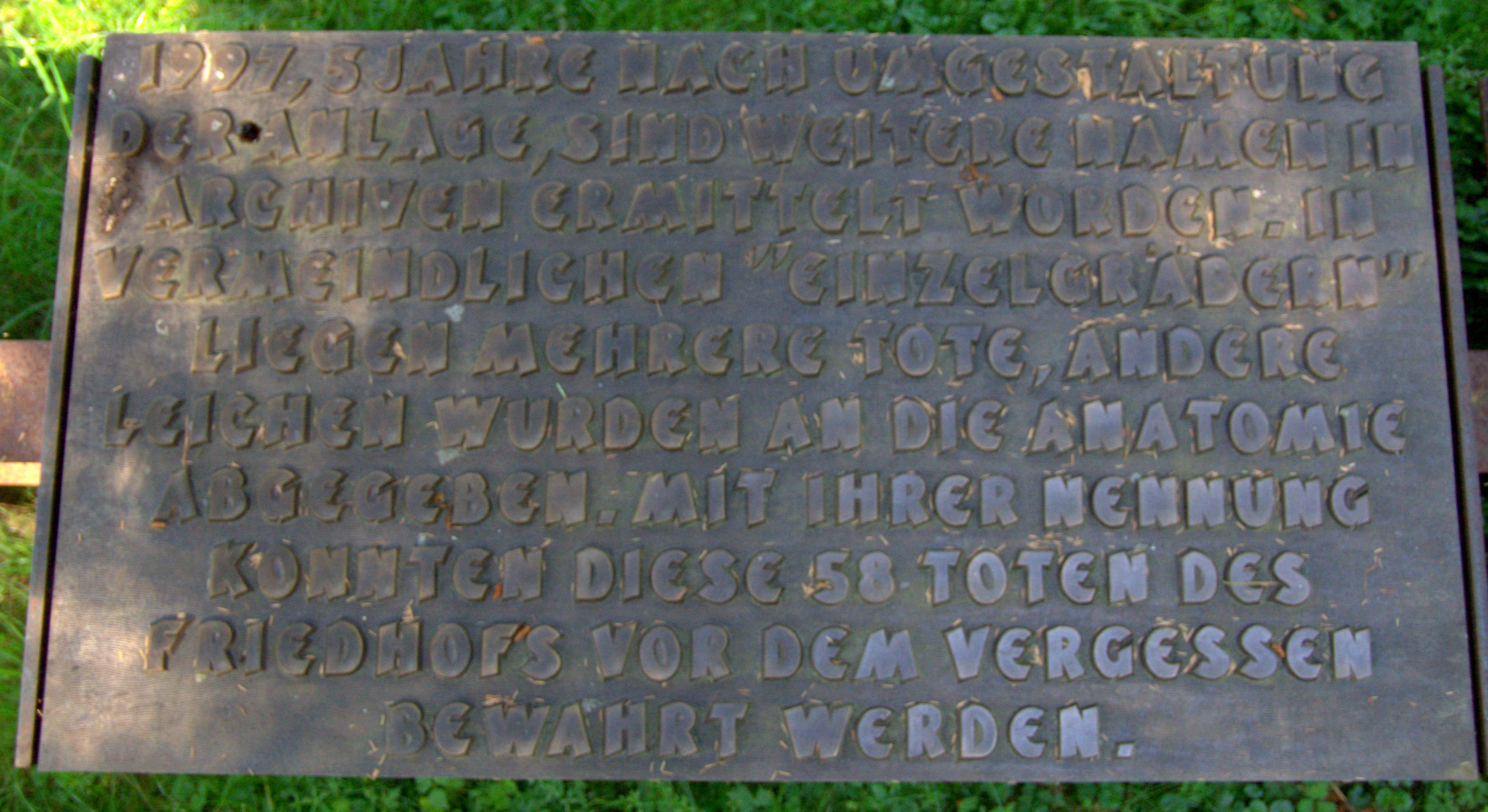 Gedenktafeln für die Ehrung der verstorbenen des Kriegsgefangenenlagers Stalag IX A Ziegenhain